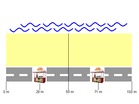 Iceseller problem 3